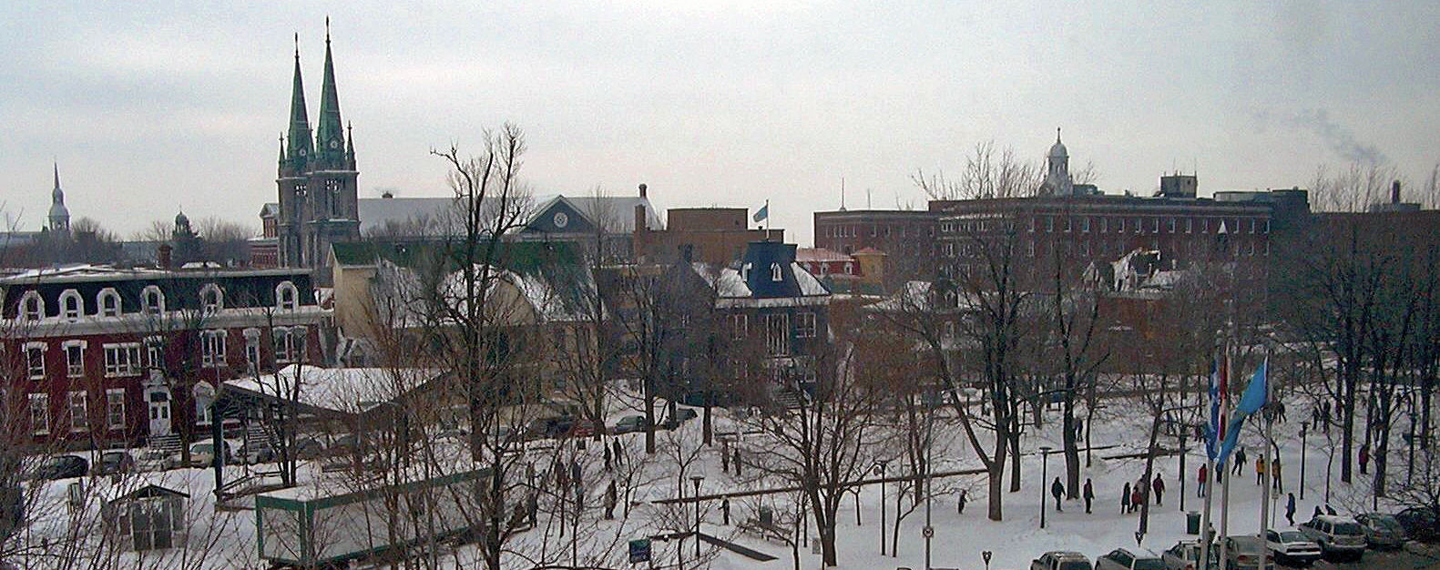 Patineurs au parc Casimir-Dessaules de Saint-Hyacinthe. Pierre Denis, auteur de cette photo.